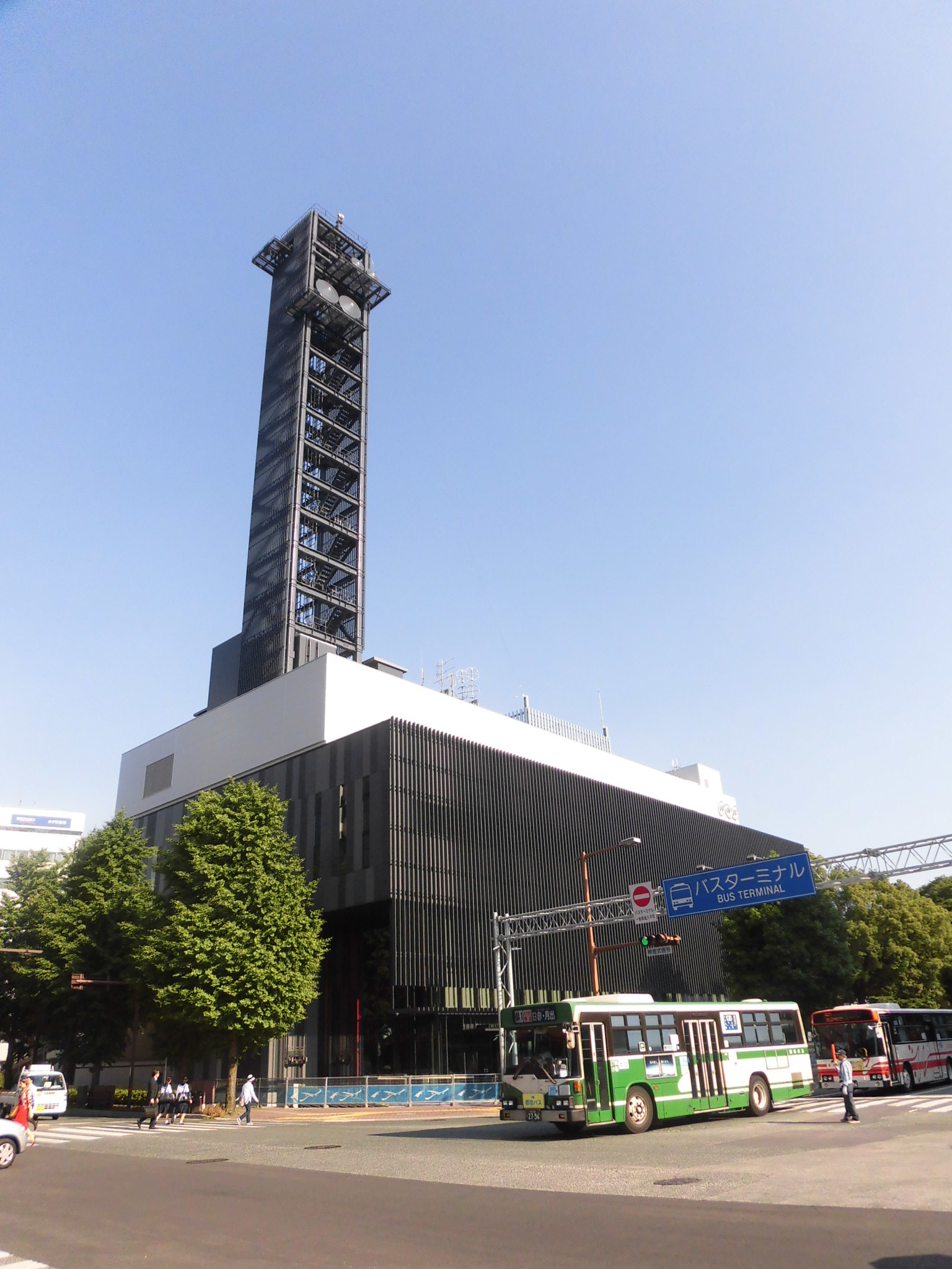 熊本市中央区にあるNHK熊本放送局